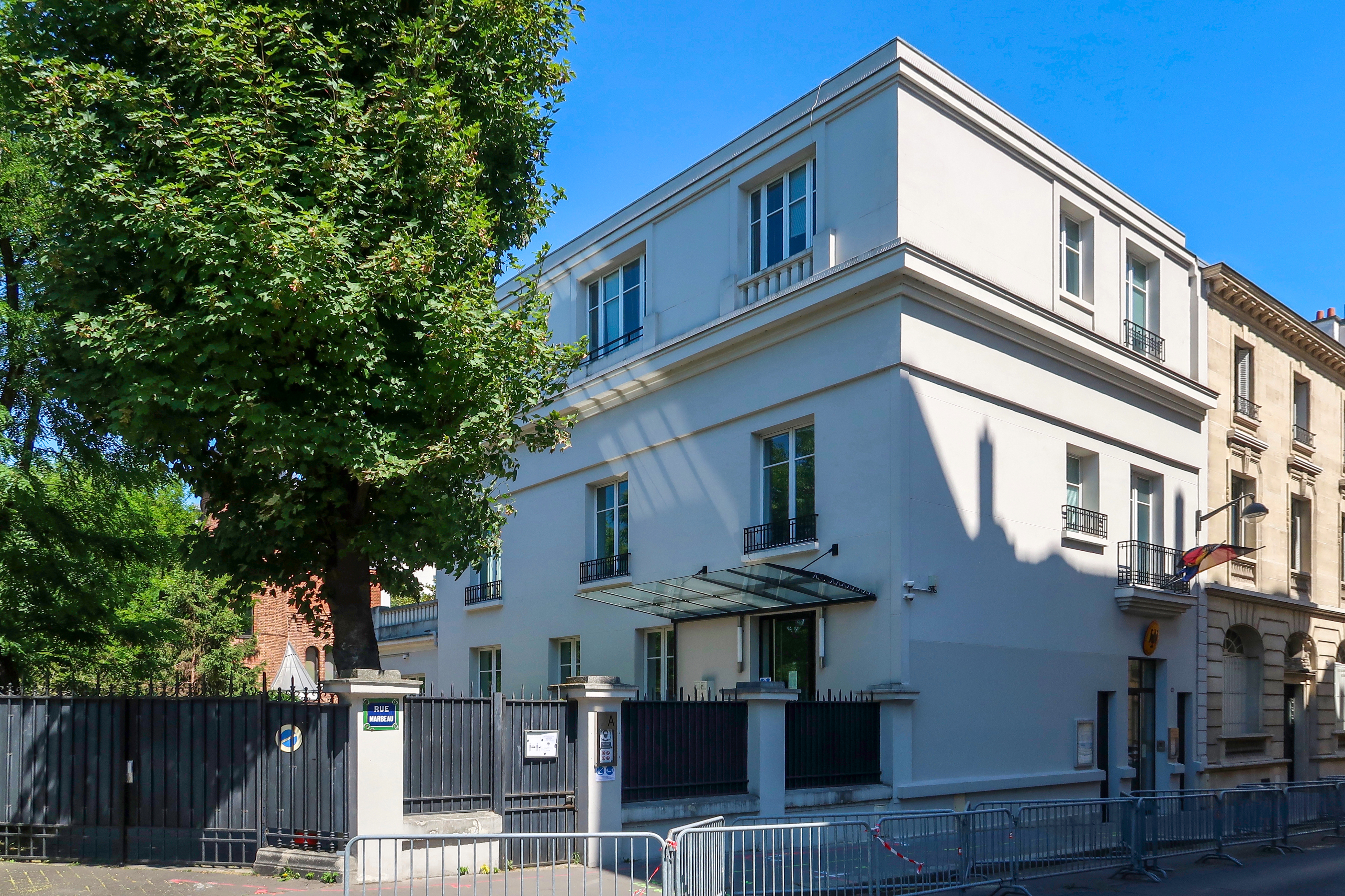 Locaux de l'ambassade d'Allemagne en France, 28 rue Marbeau (Paris, 16e).